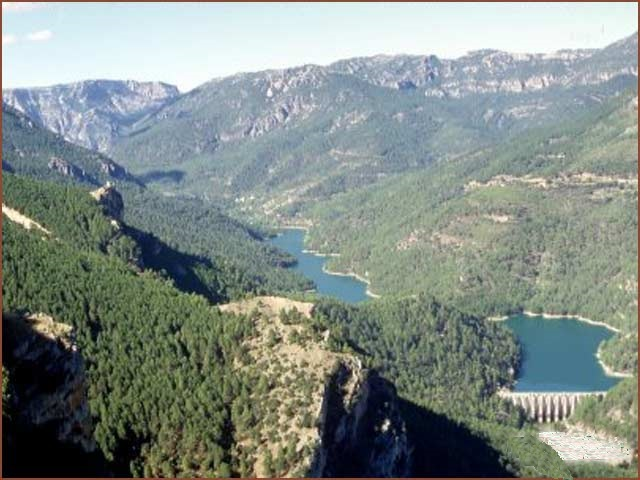 Presa del Embalse de Anchuricas, construida por empresa privada para mantener la cota de presión del salto de Miller (agua conducido a varios kilómetros cauce abajo)